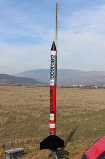 Ракета "Осогово" преди излитане.